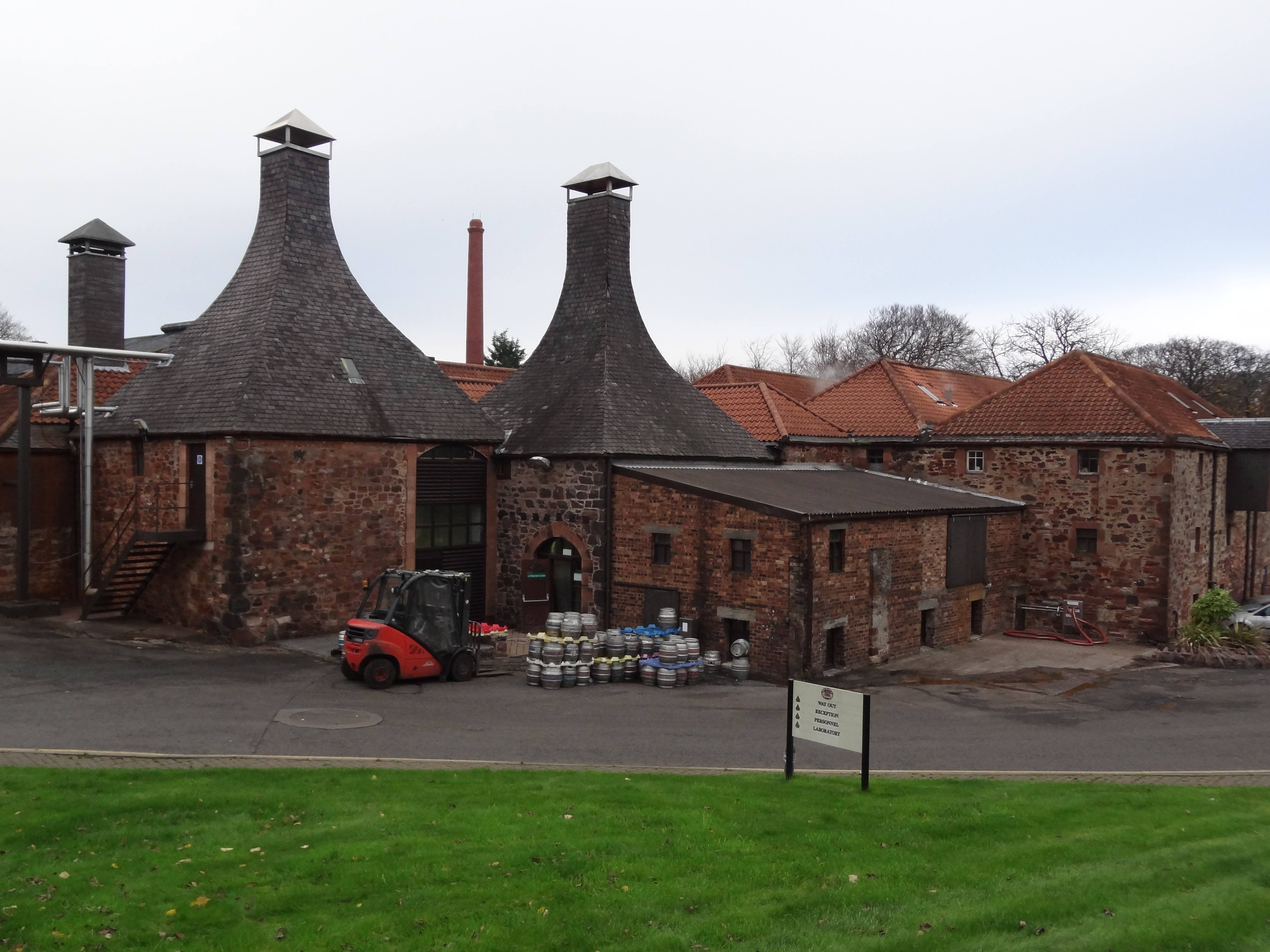 Belhaven, Malzdarren mit typischen Wrasenabzügen